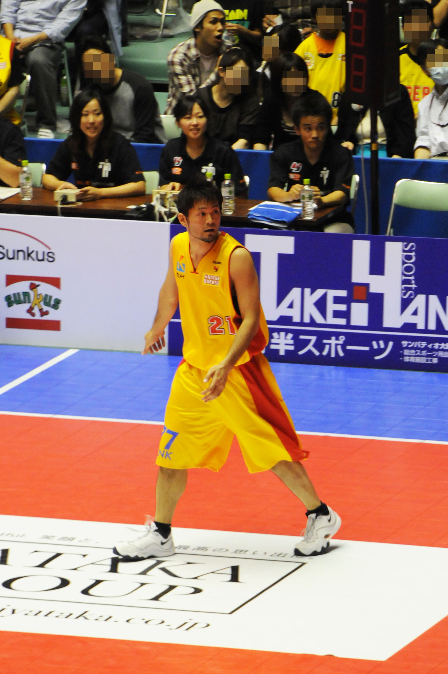 仙台89ers、高岡大輔選手。秋田県立体育館で。